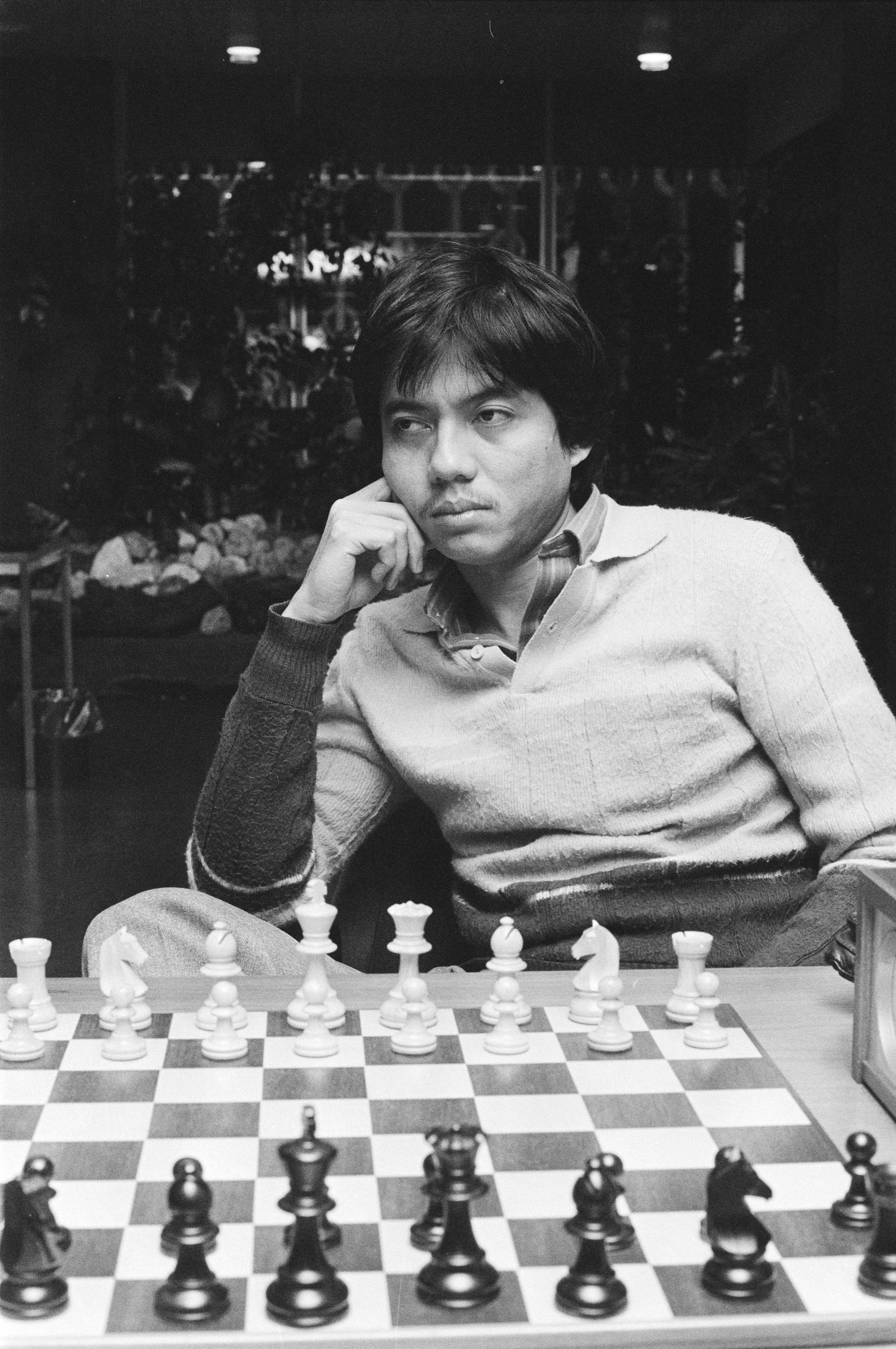 Collectie / Archief : Fotocollectie Anefo Reportage / Serie : Interpolis Schaaktoernooi in Tilburg Beschrijving : Torre in actie Datum : 30 september 1982 Locatie : Noord-Brabant, Tilburg Trefwoorden : schaakborden, schaakstukken, schaken, schakers, tournooien Fotograaf : Dijk, Hans van / Anefo Auteursrechthebbende : Nationaal Archief Materiaalsoort : Negatief (zwart/wit) Nummer archiefinventaris : bekijk toegang 2.24.01.05 Bestanddeelnummer : 932-3494